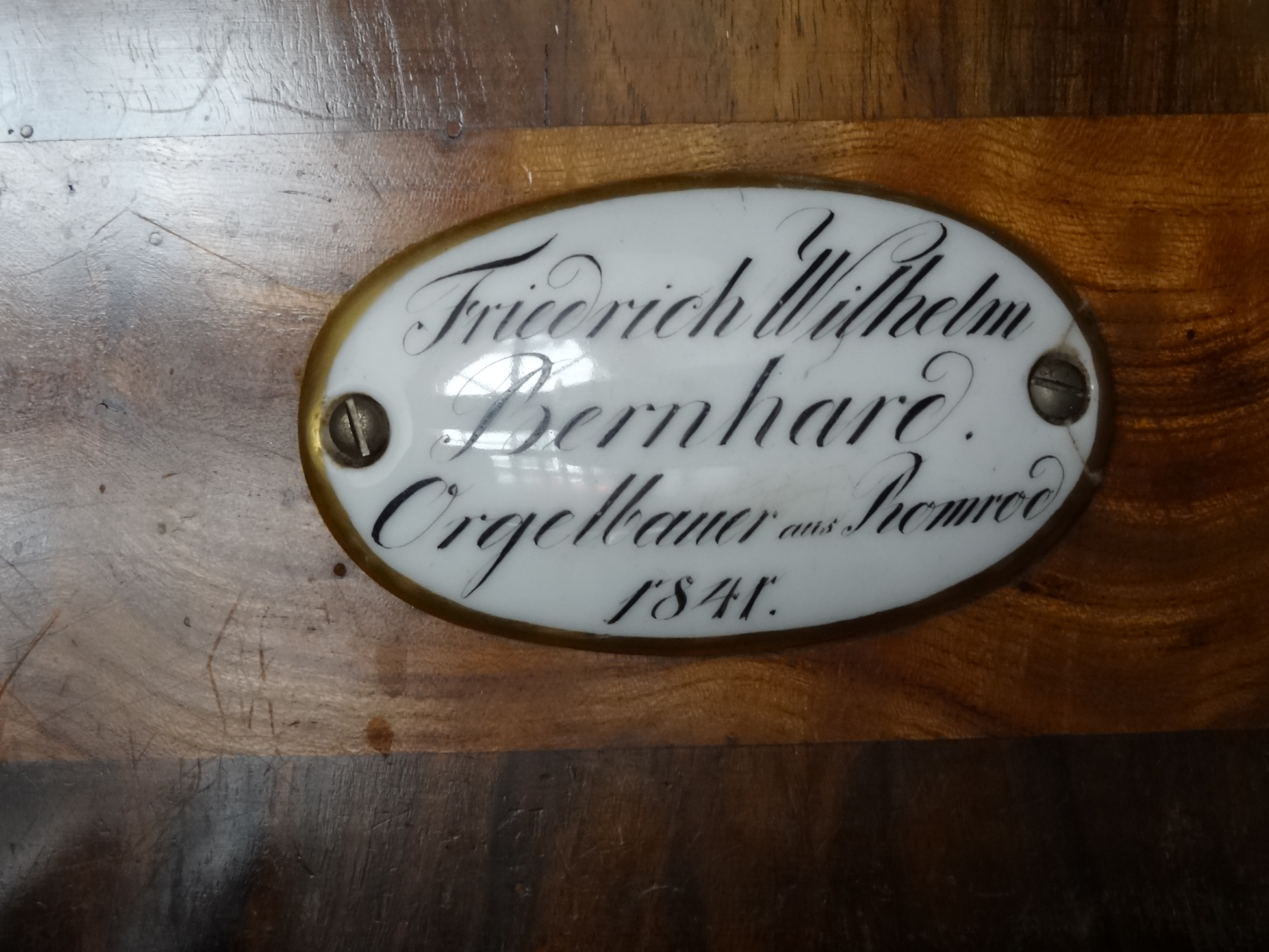 Evangelische Kirche Pohl-Göns